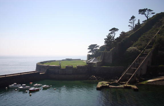 Fort du Mengant (Plouzané)